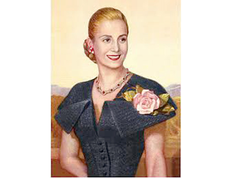 nacio el 7 de mayo de 1919 en los toltos argentina fallecio el 26 de julio de 1952 en buenos aires